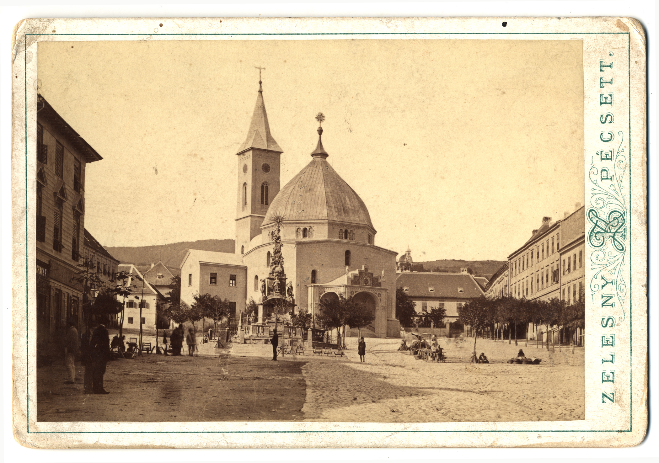 A pécsi Széchenyi tér.